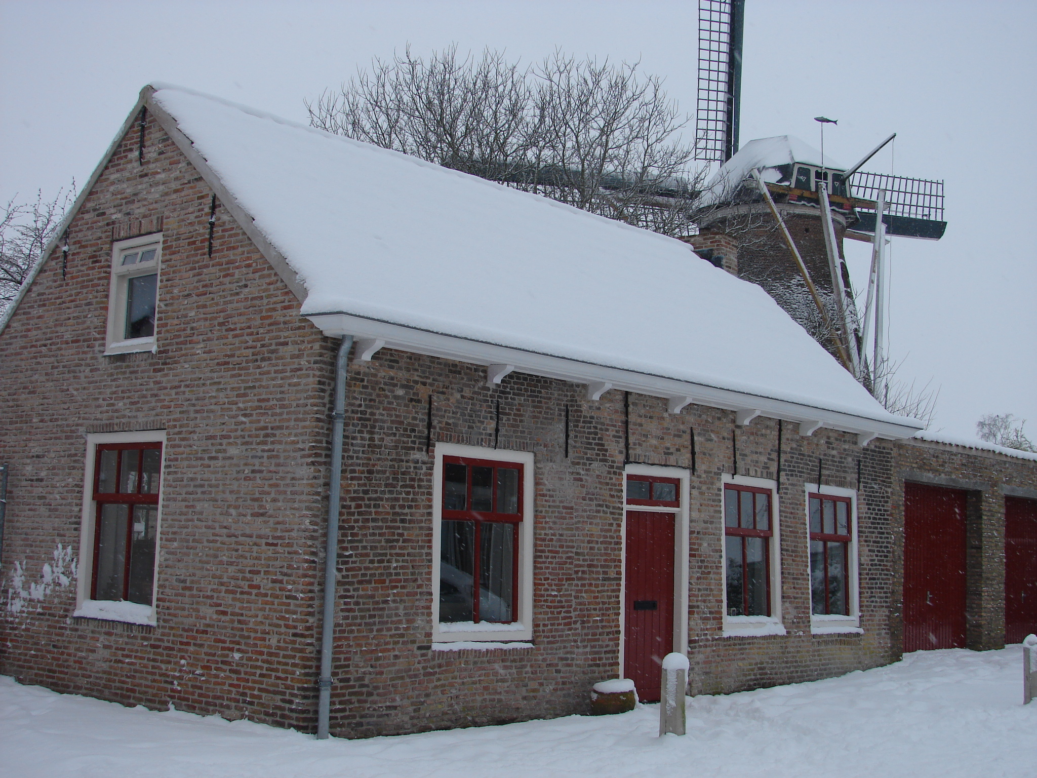 Molenaars-knechtenwoning uit de 19e eeuw